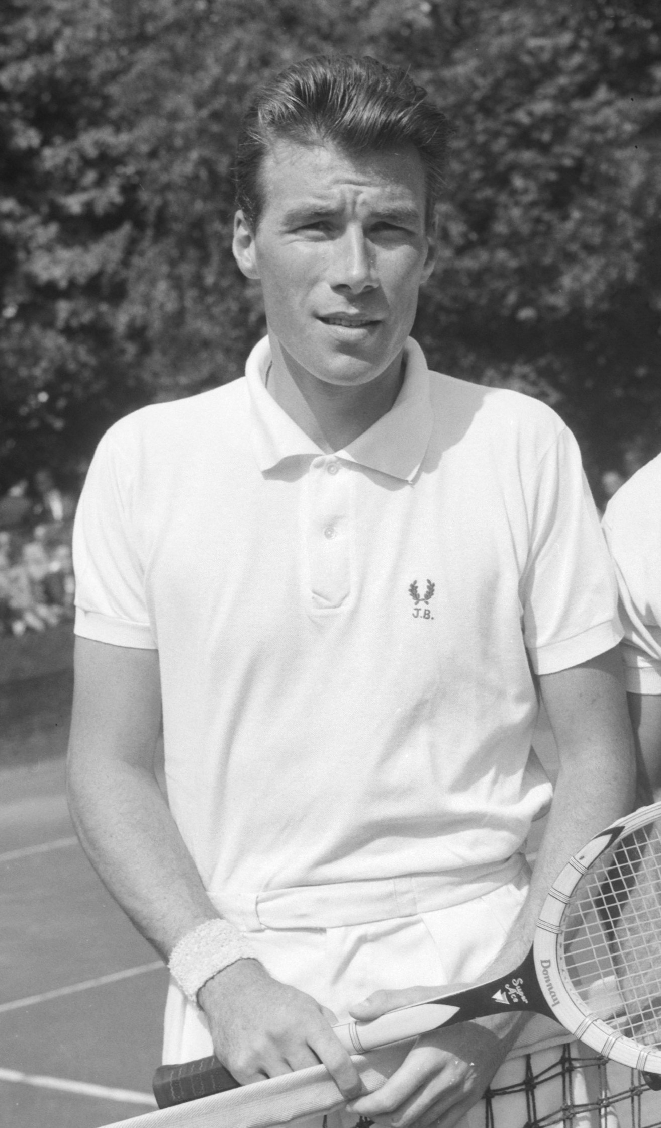 Finale van het internationale tennistoernooi te Hilversum. Jacques Brichant